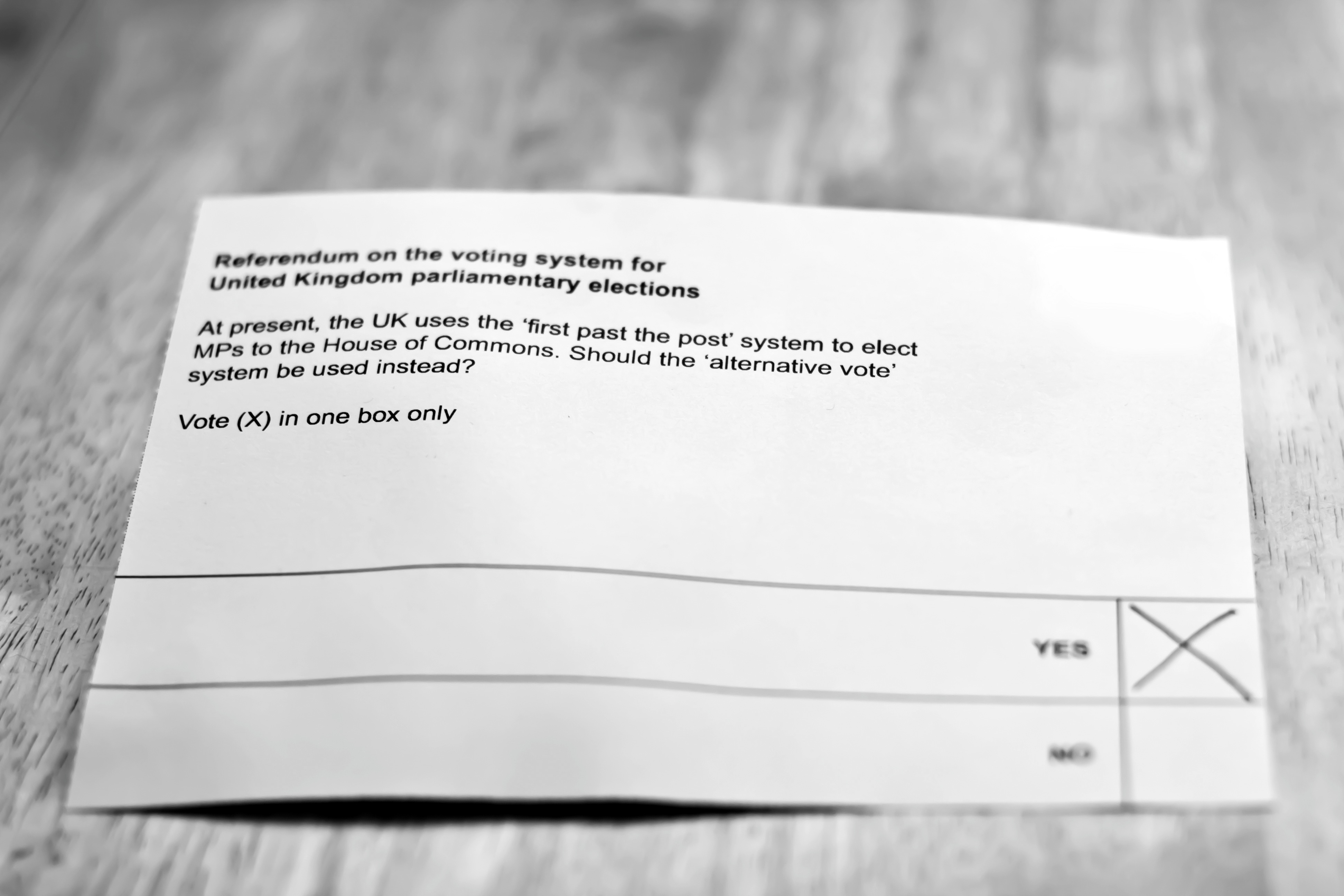 2011 in London